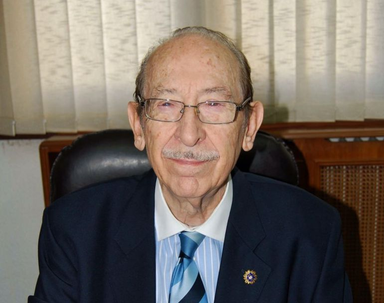 Ramón Bello Bañón en 2010